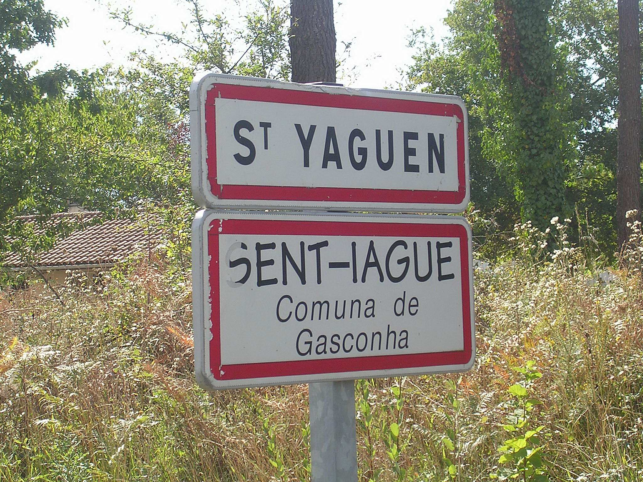 Panneau en français et gascon d'entrée dans la commune de Saint-Yaguen, dans le département français des Landes